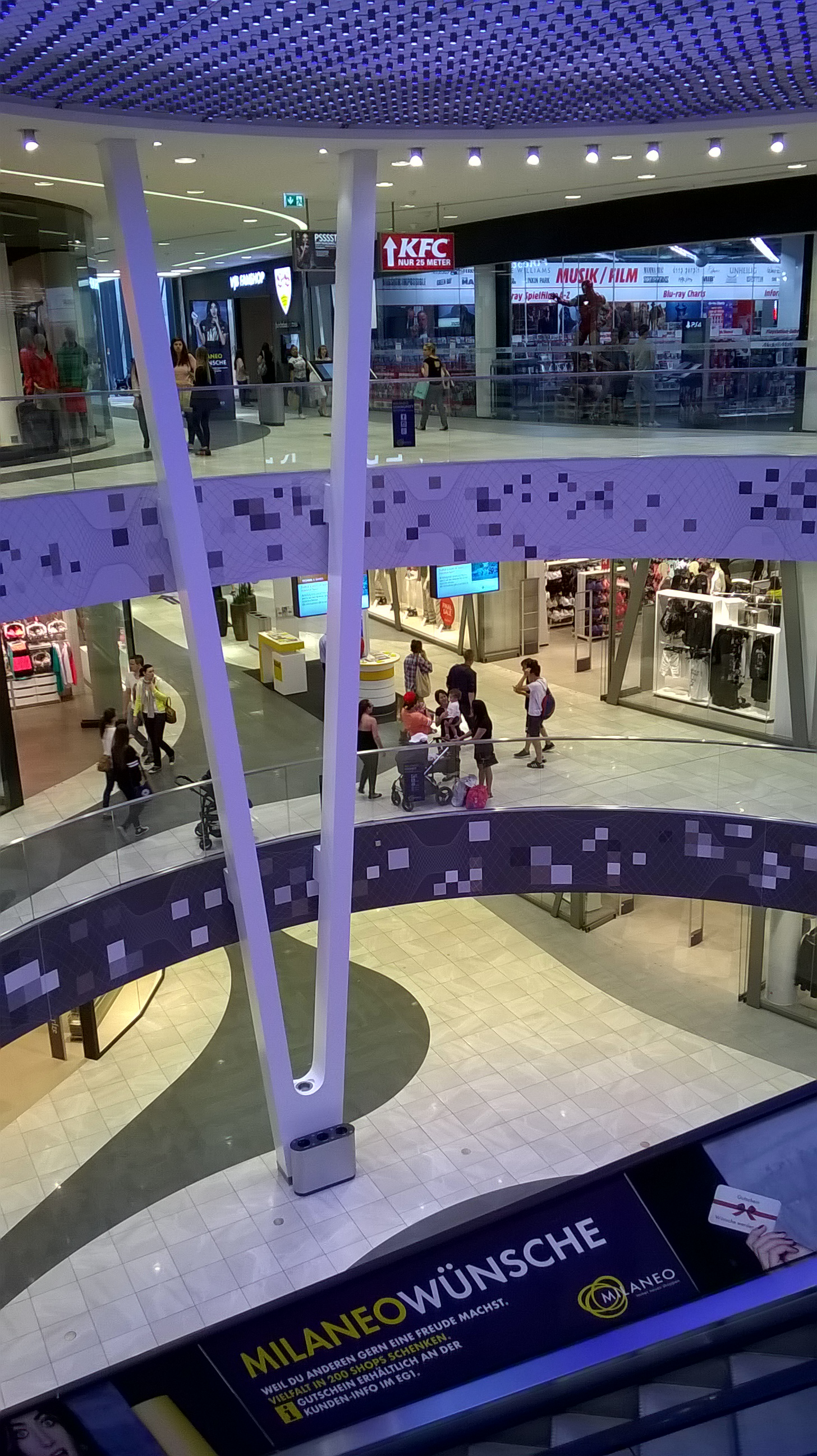 Verkaufsetagen im Milaneo